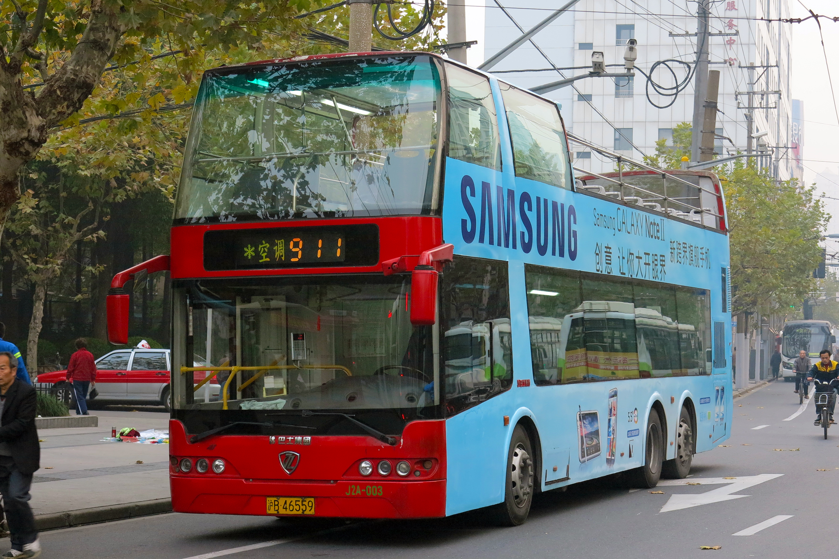 Shanghai Bus 911 | Jin Ling | JLY6120SBK | ZhongHua Road 上海公交911路雙層客車 | 南京金陵客車 | JLY6120SBK | 中華路 翁家支弄